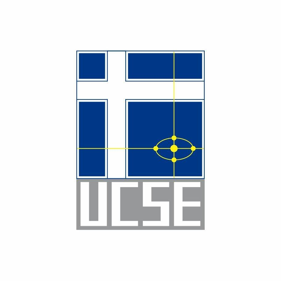 Logo de la Universidad Católica de Santiago del Estero